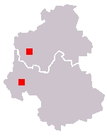 Carte resprésentant les départements de la Savoie et de la Haute-Savoie.